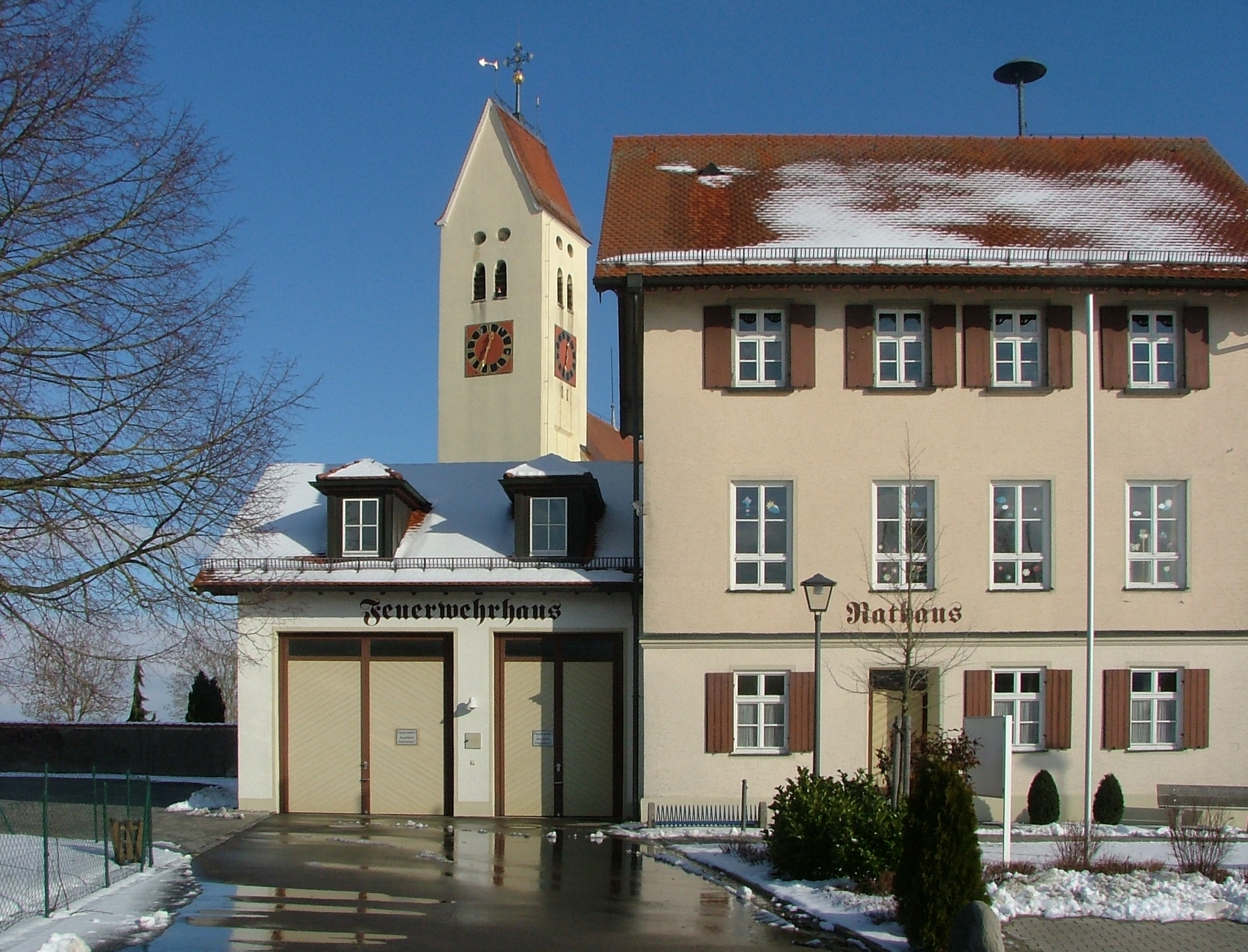 Oberopfingen, Gemeinde Kirchdorf an der Iller; Rathaus mit Feuerwehrhaus, im Hintergrund die Pfarrkirche